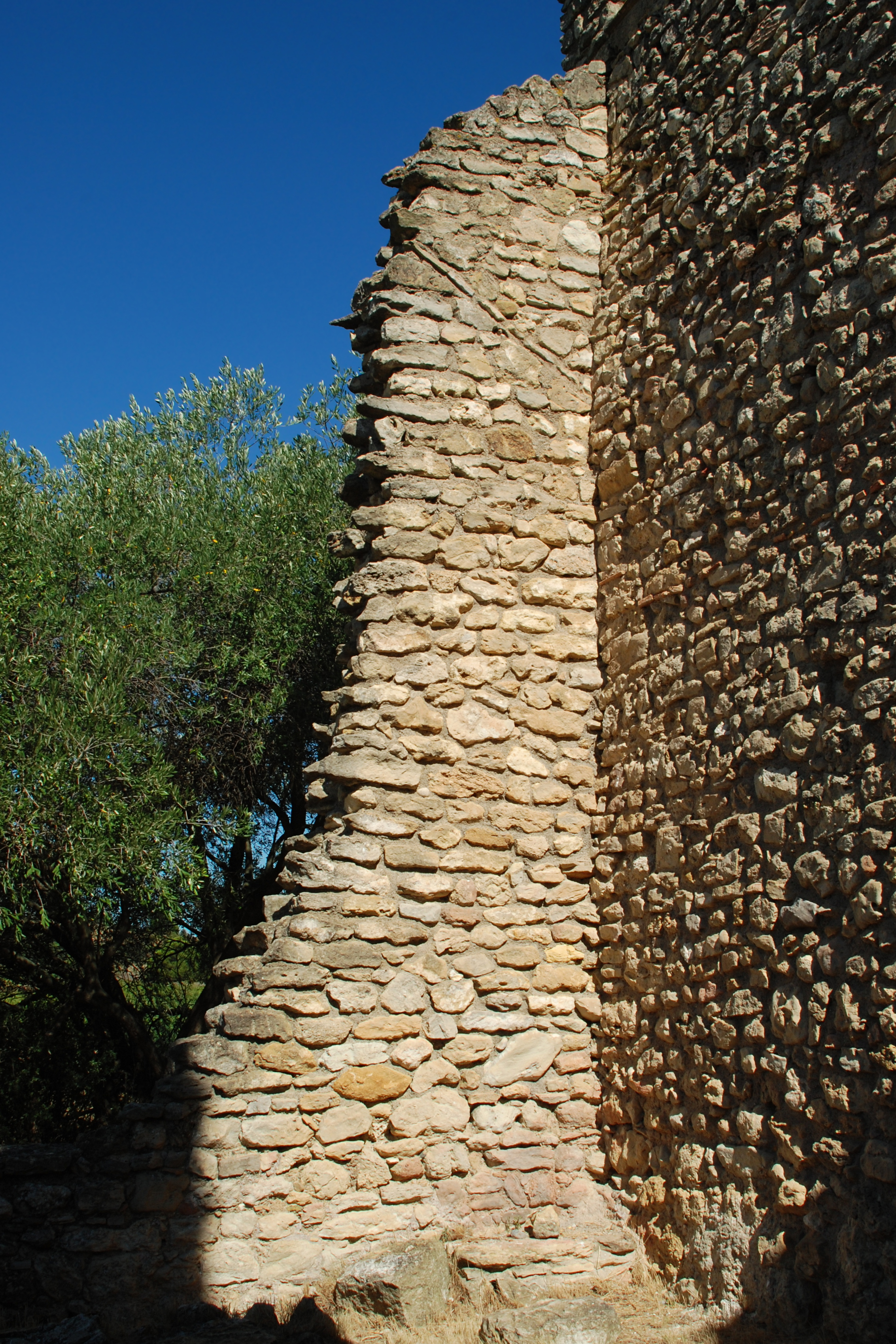 France - Languedoc - Aude - Moussan - chapelle Saint-Laurent (préroman) .